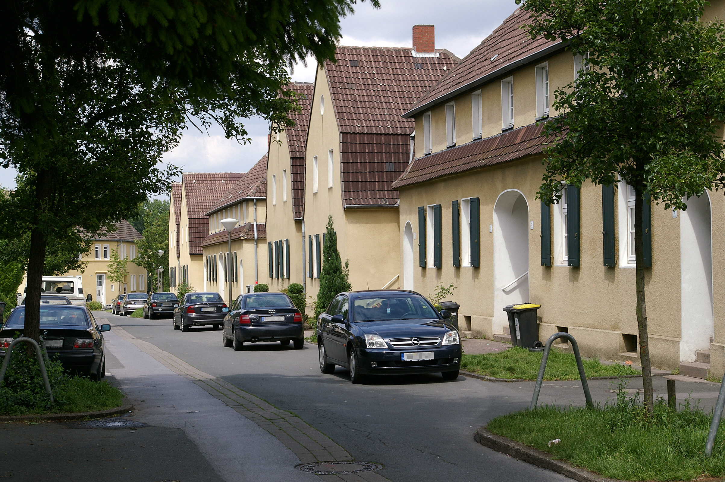 Müsersiedlung, Dortmund-Derne, Nordrhein-Westfalen. Jüngere Bebauung Bogenstraße